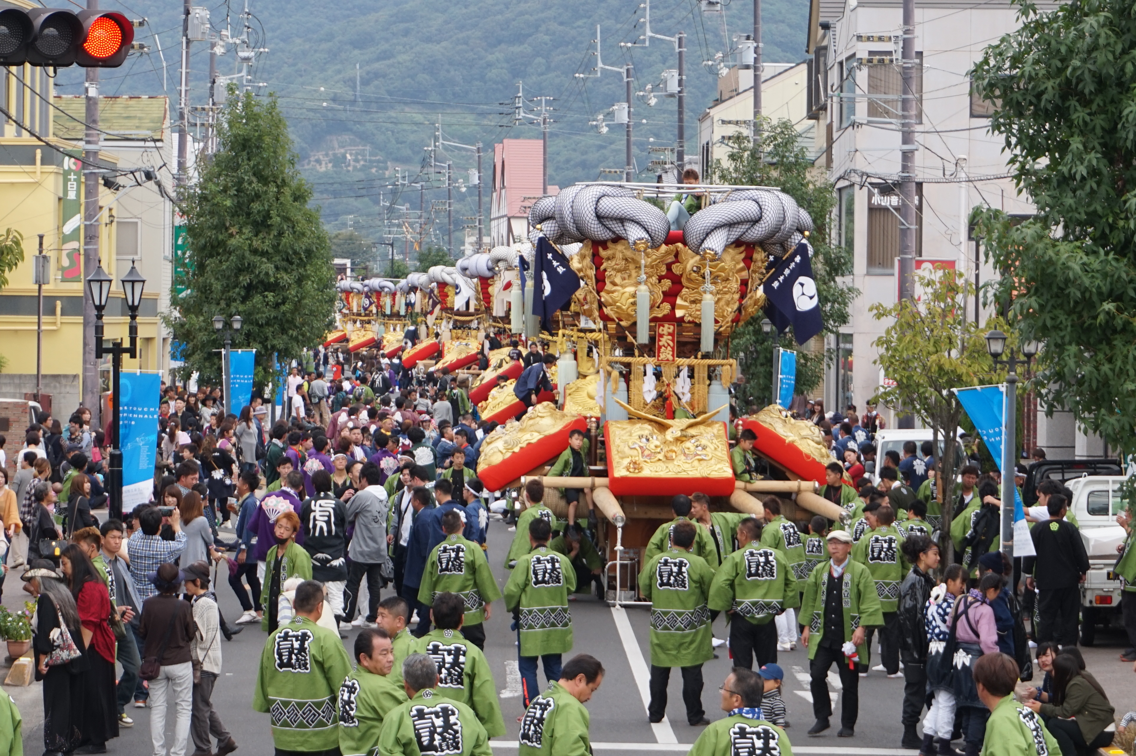 七號地、上市町に勢揃いしたところ